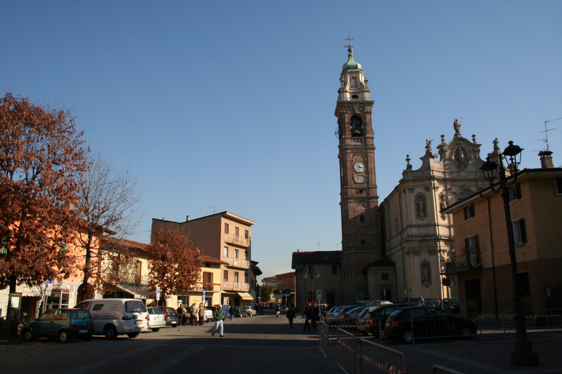 Osio Sotto, Piazza Giovanni XXIII.